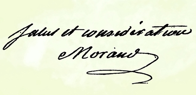 Korrespondenz Signatur Divisionsgeneral Joseph Morand